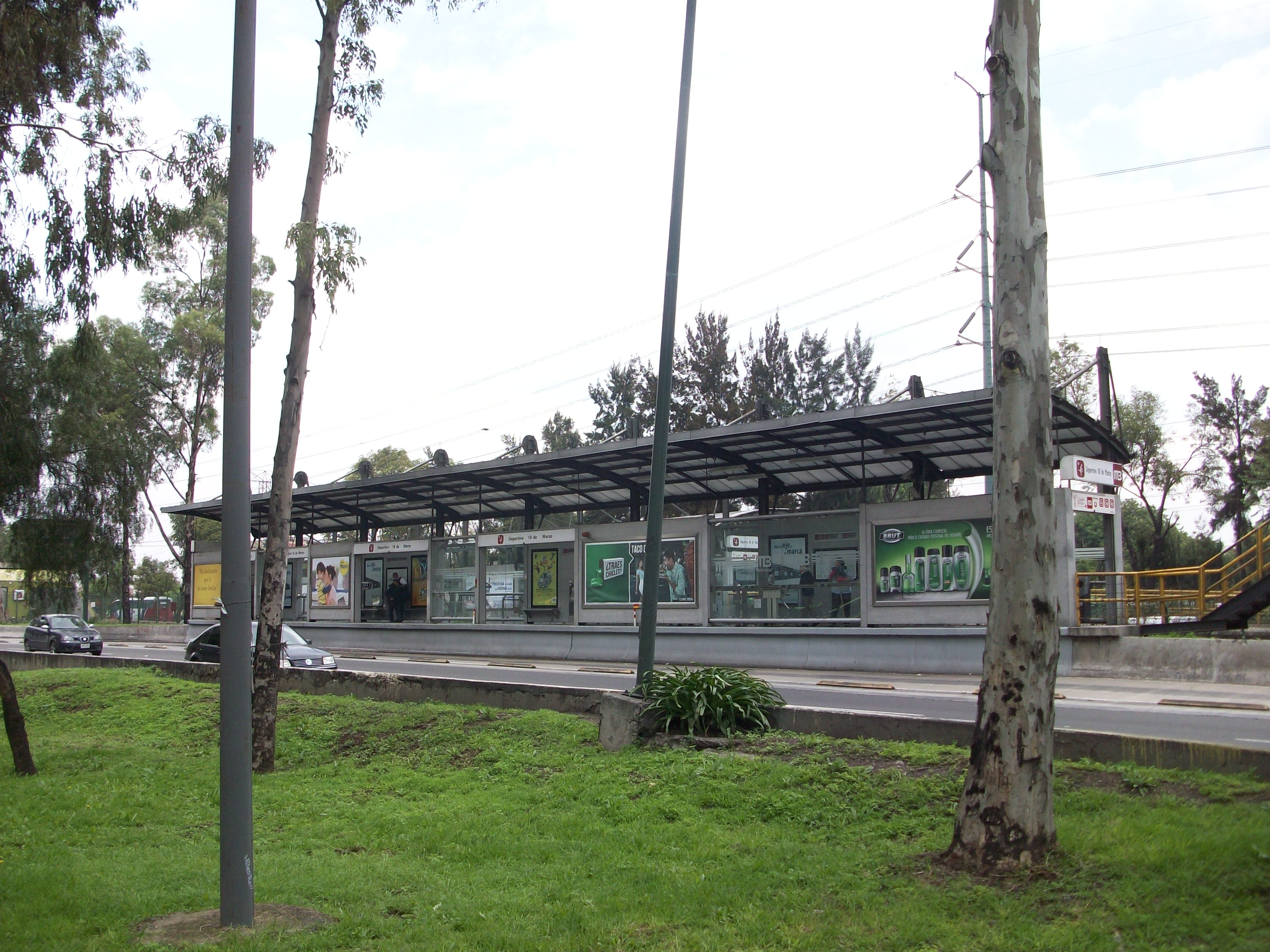 Estacion